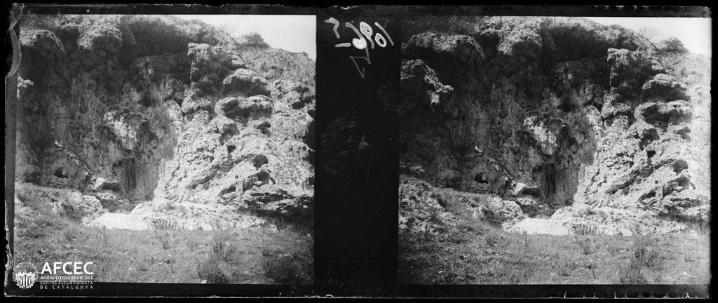 Imatge